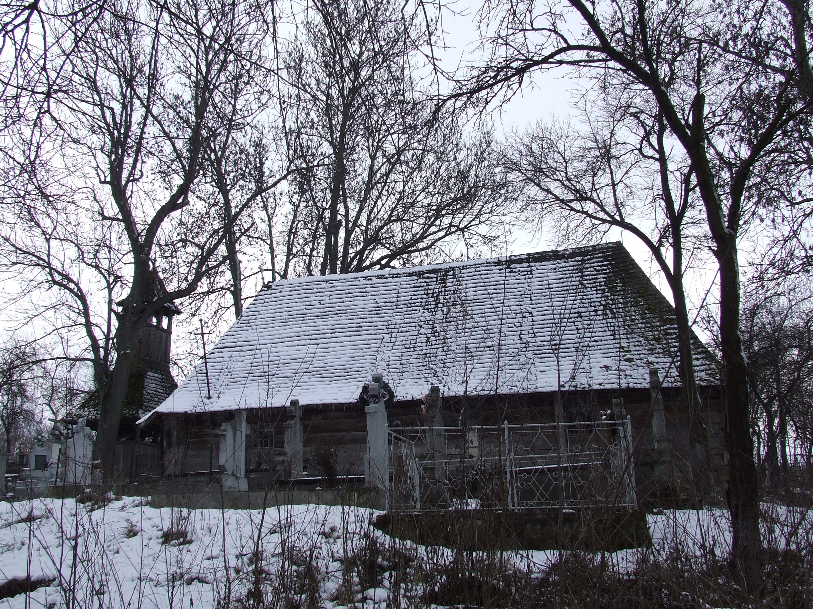 Biserica de lemn din Petea, judeţul Mureş.